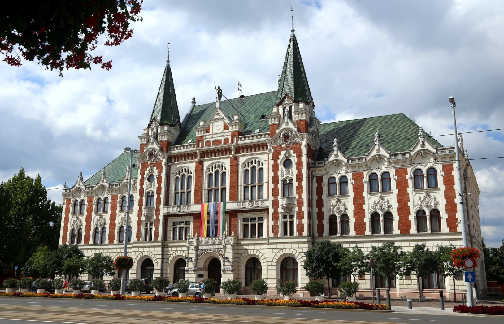 Újpesti városháza